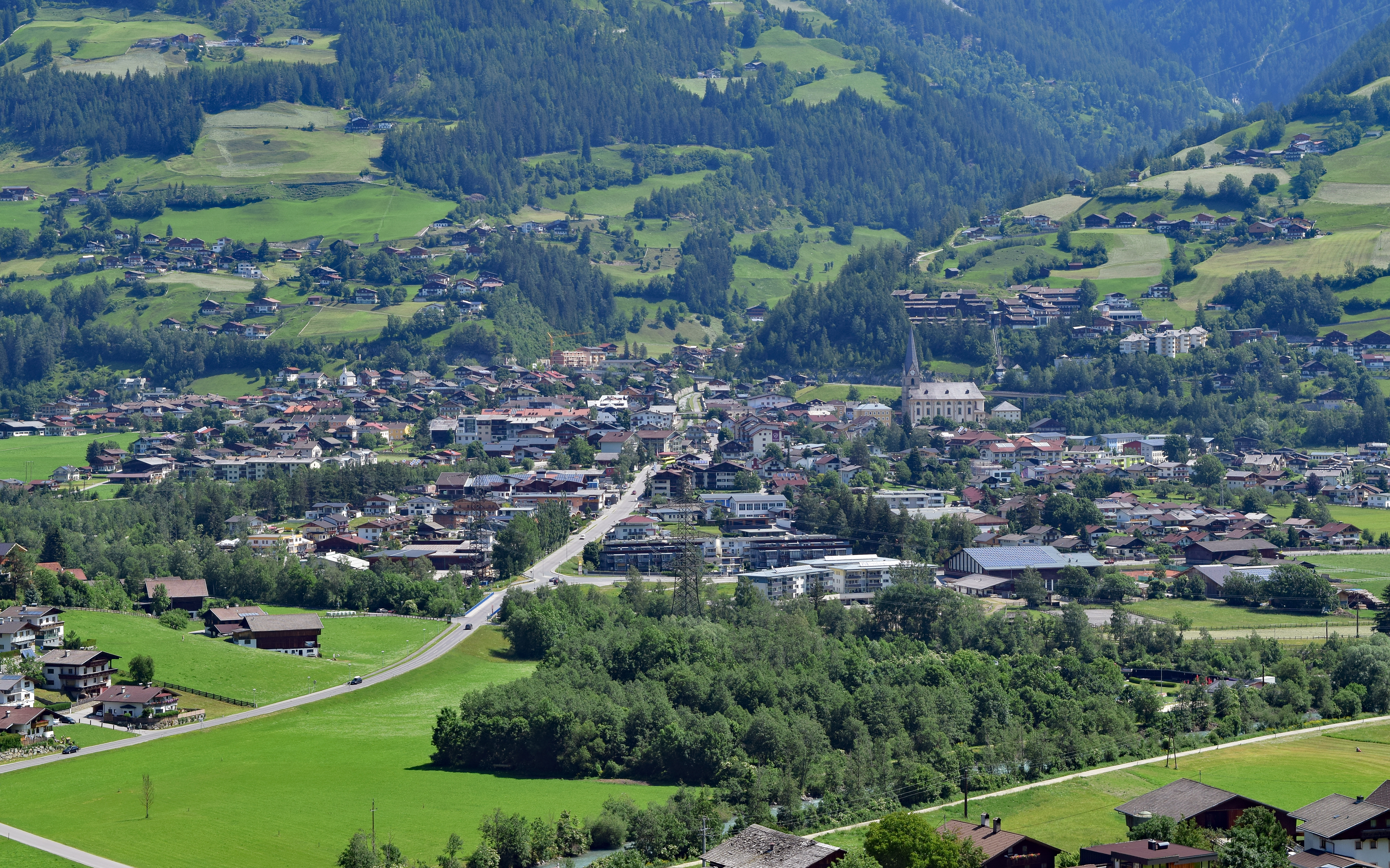 Matrei in Osttirol 'Q1908954' (Q1908954)